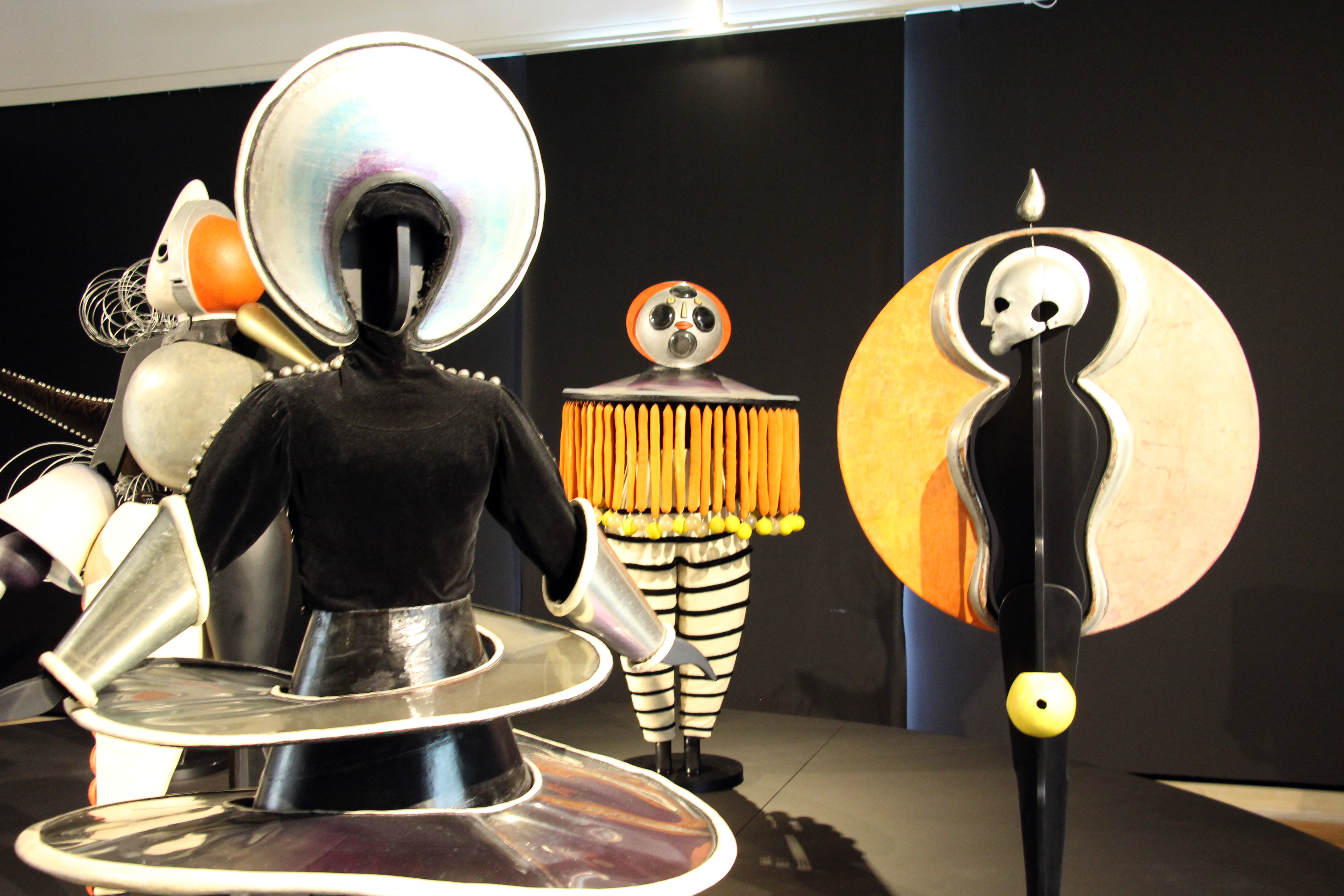 Oberer Schlossgarten | Konrad-Adenauer-Straße Triadisches Ballett Oskar Schlemmer 1922